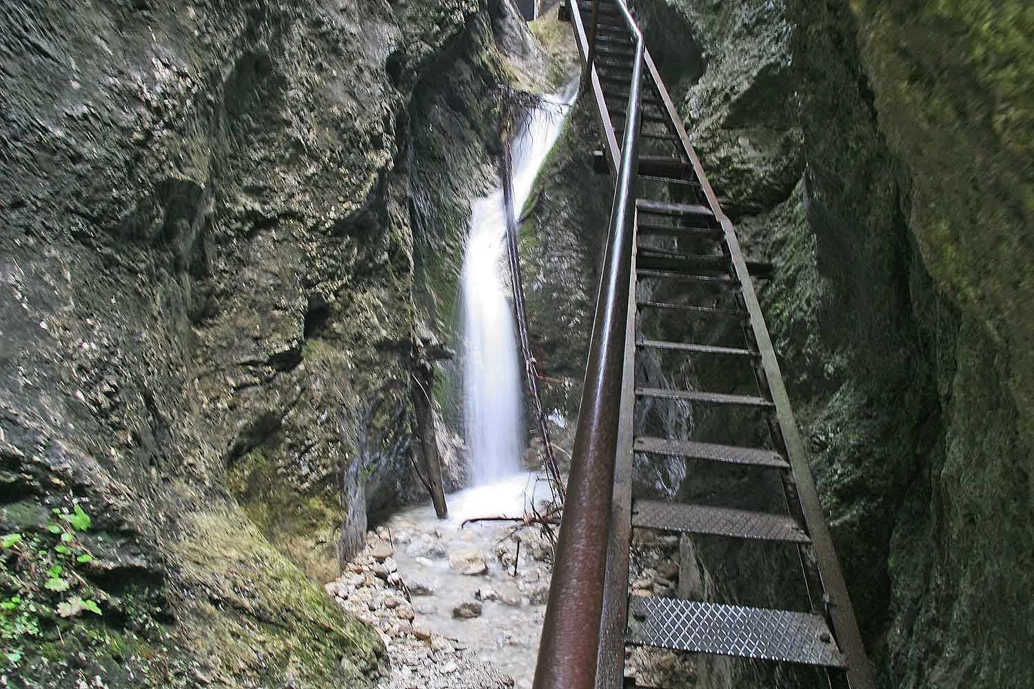 Horné diery, Malá Fatra, district Žilina, Slovakia autor:Prazak date: 30. 6. 2006